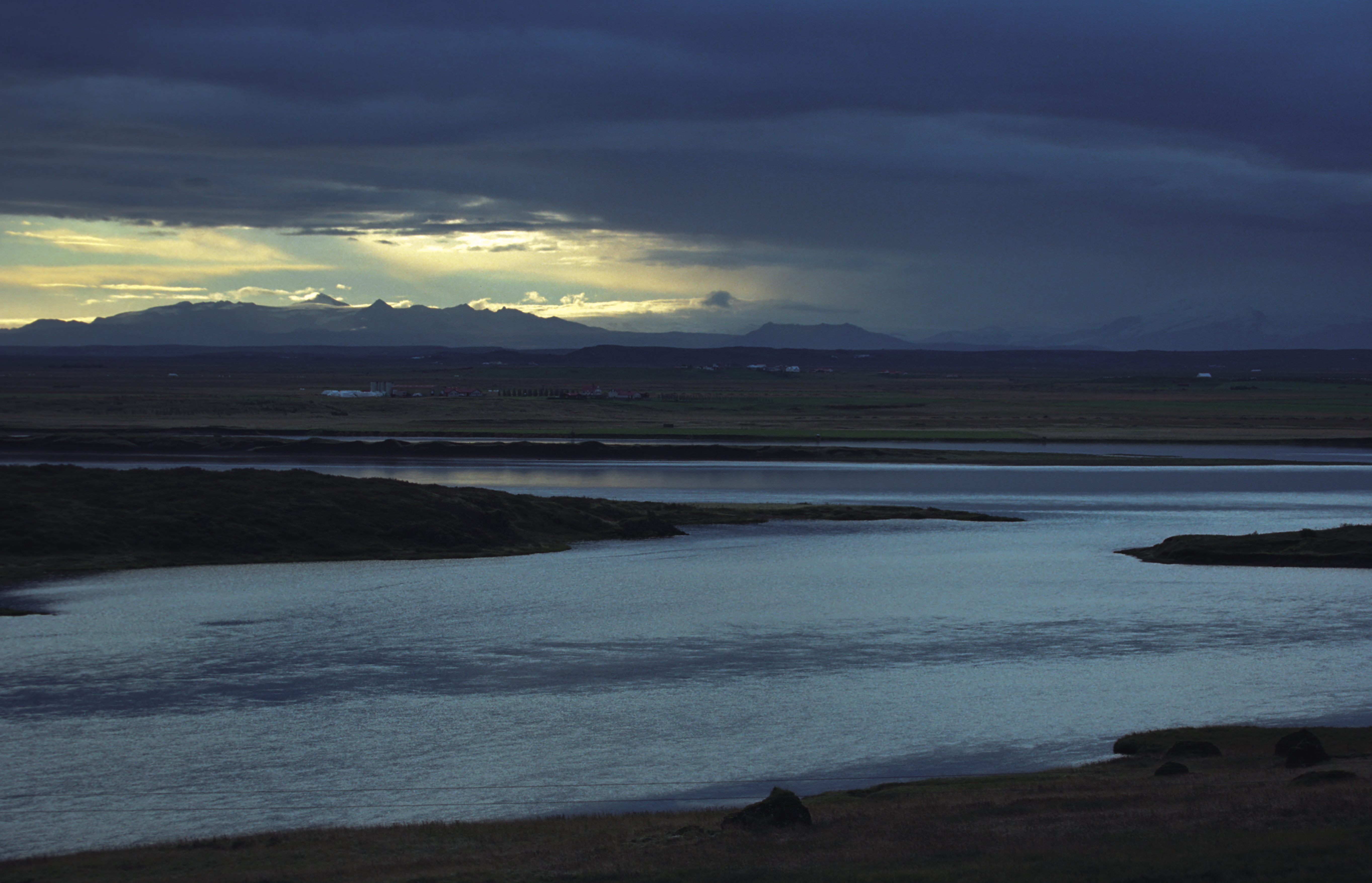 Rzeka Þjórsá o świcie